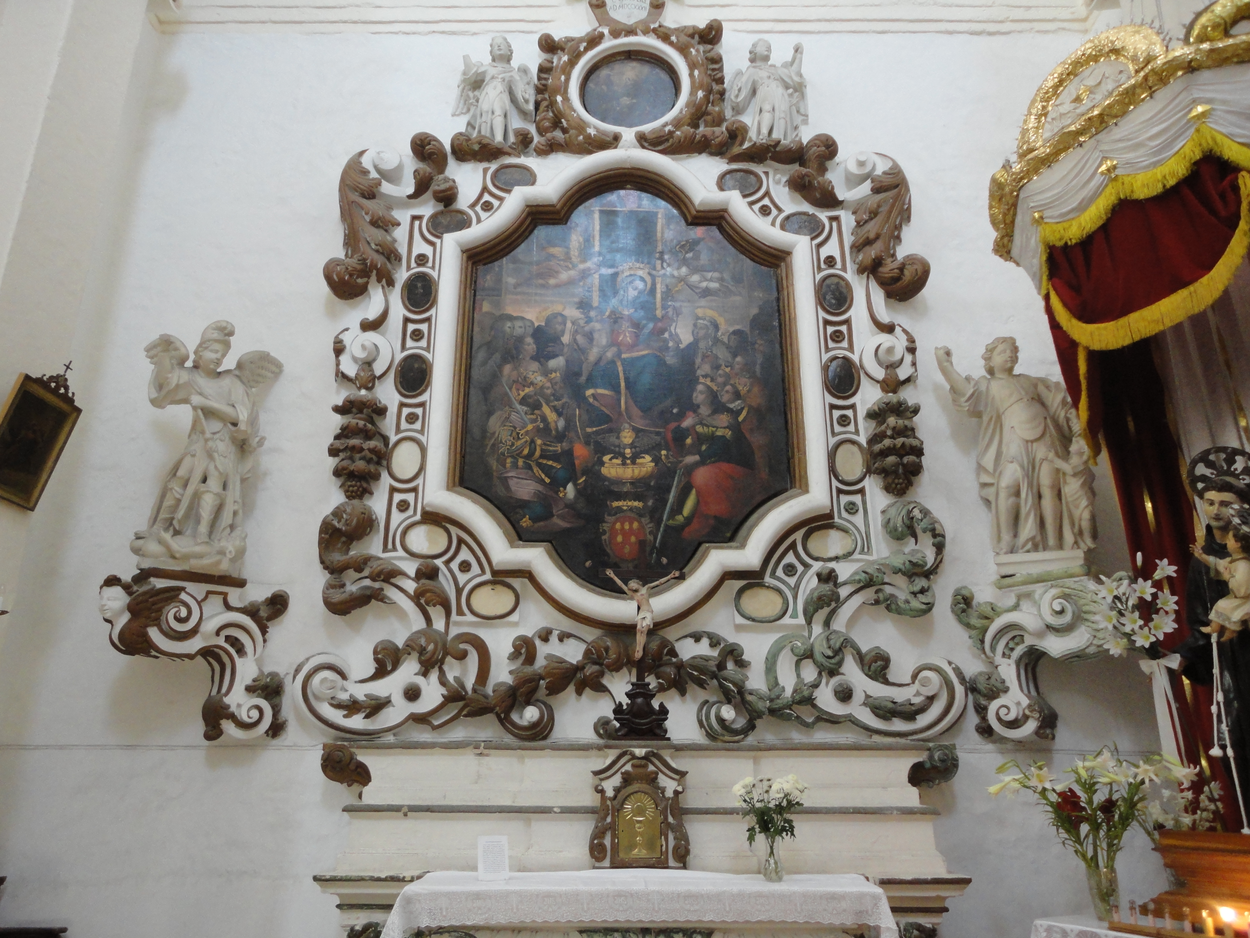 Altare Madonna del Rosario Chiesa san Sebastiano Galatone, Lecce